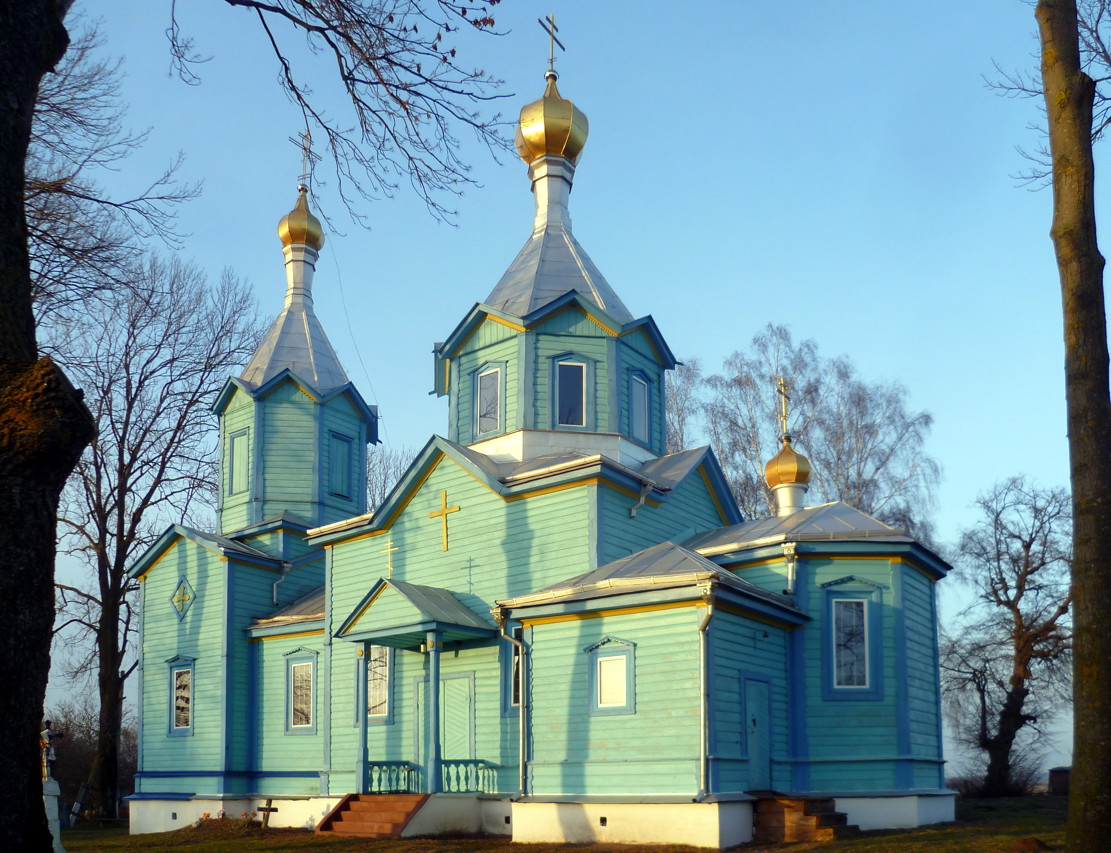 Покровська церква (1904 рік) - вигляд з південного сходу - с. Бобичі Володимир-Волинський район Волинська область Україна